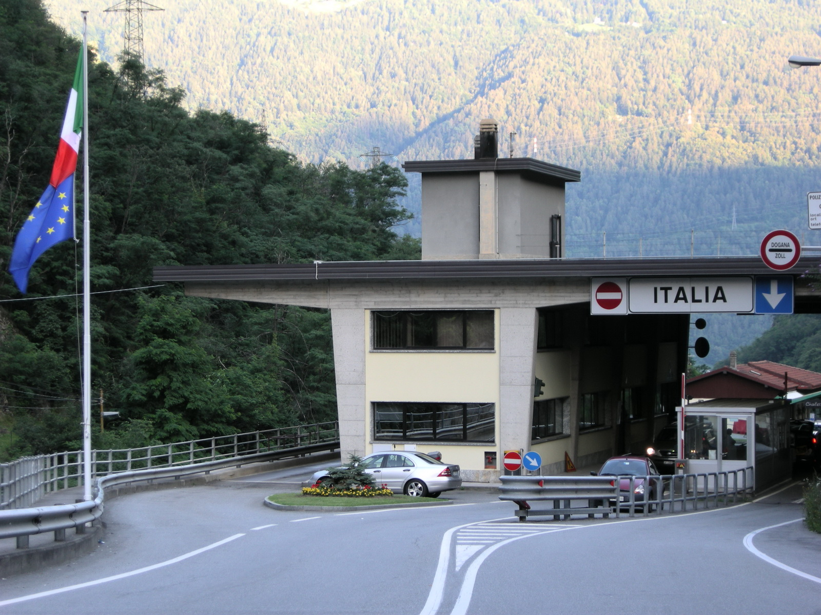 Siamo a 2km da Tirano in provincia di Sondrio, alta Valtellina